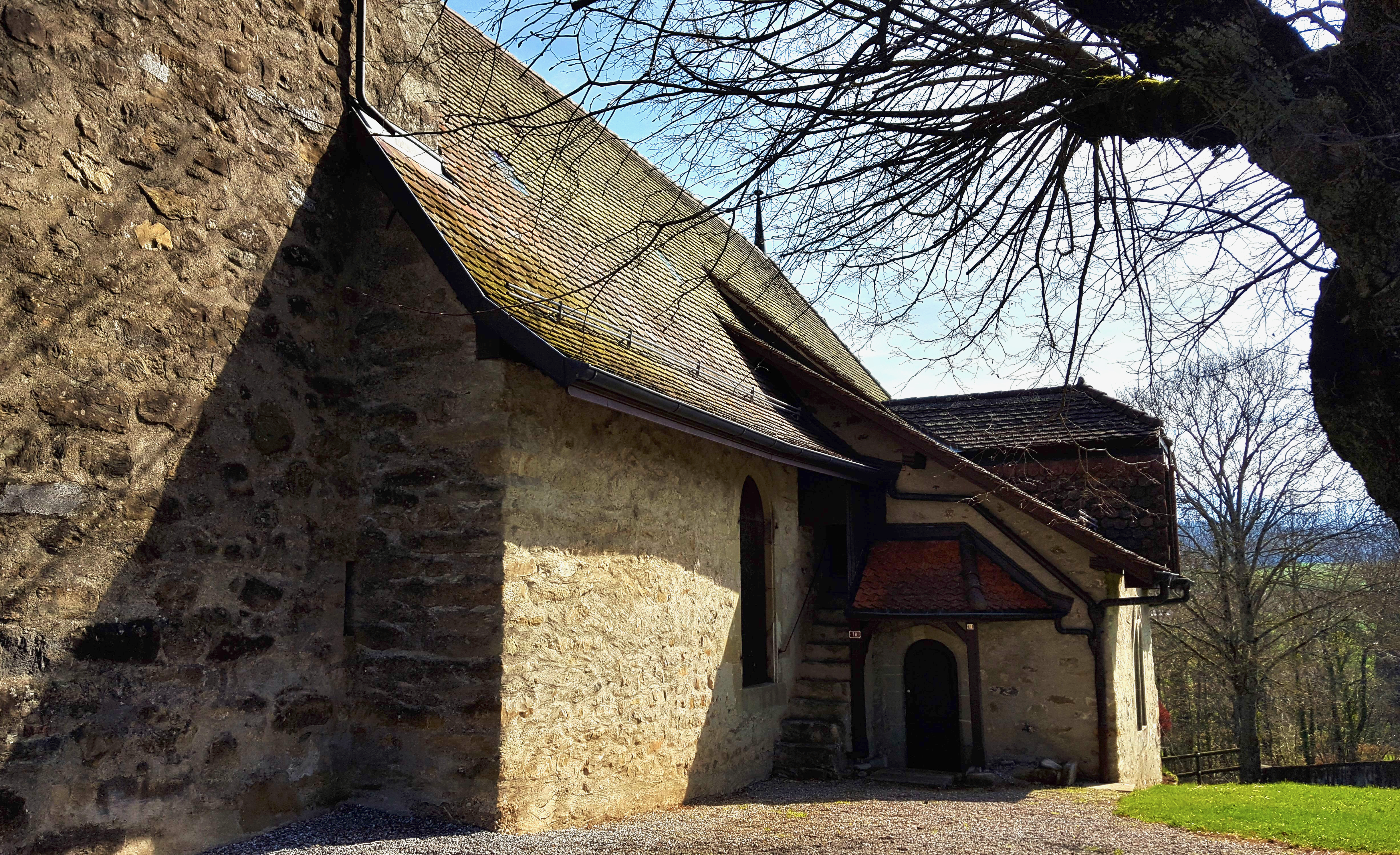 Chatillens Kirche Saint-Maurice, Seitenansicht